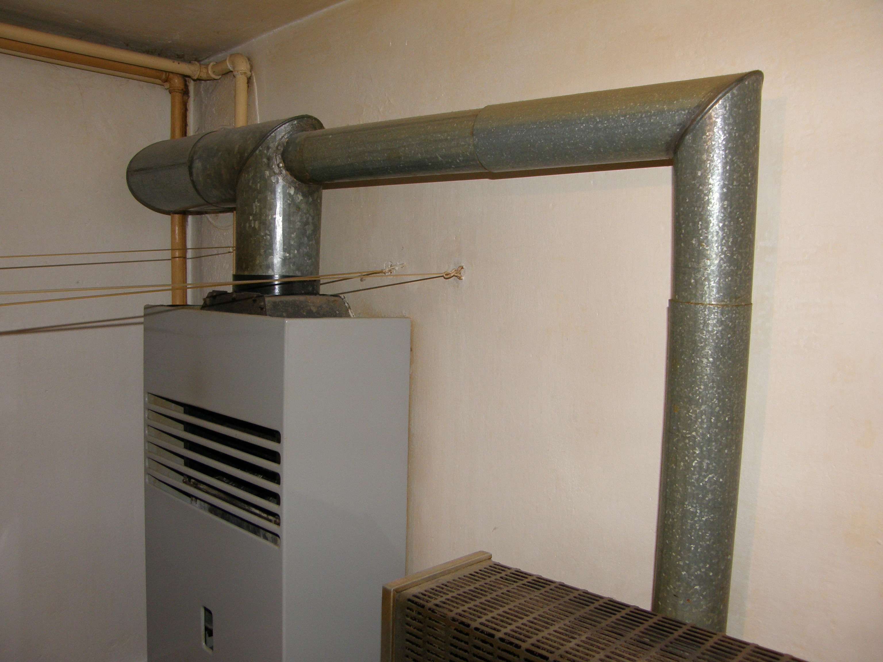 Sopouch